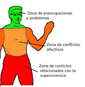 Relación entre las zonas del cuerpo y las emociones guardadas en ellas.